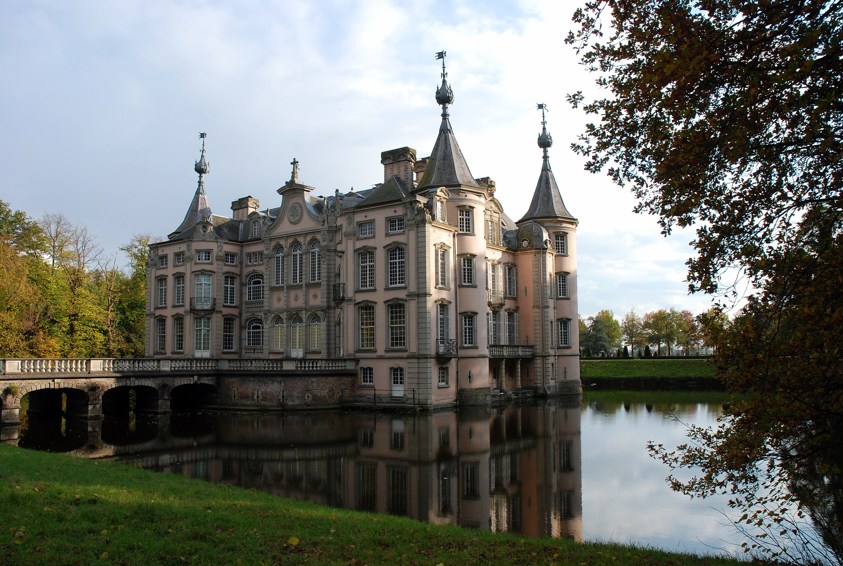 Het kasteel van Poeke (België)